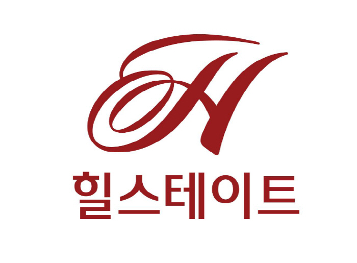 단순한 주거공간을 넘어 새로운 라이프스타일을 창조하는 라이프스타일 리더, 현대 힐스테이트